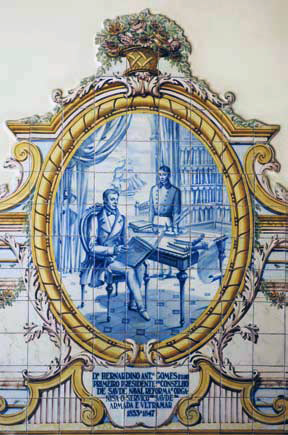 O Doutor Bernardino António Gomes, filho prepara o Regulamento da Saúde Naval Hospital da Marinha, pormenor dos azulejos da Sala do Principe, no Hospital da Marinha, Lisboa.